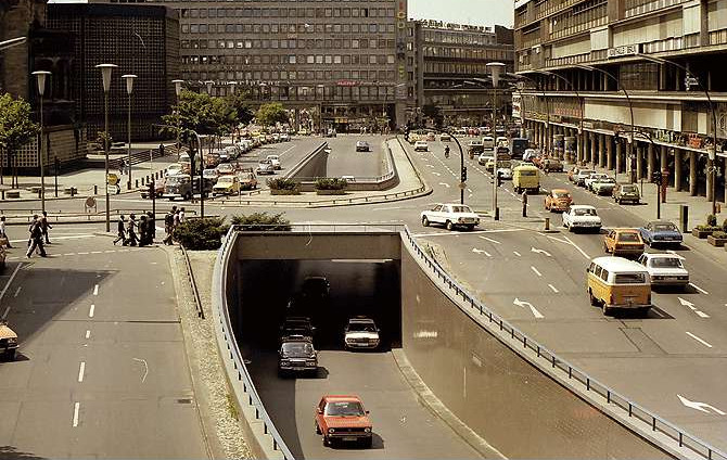 Straßentunnel Budapester Straße in Berlin-Charlottenburg.